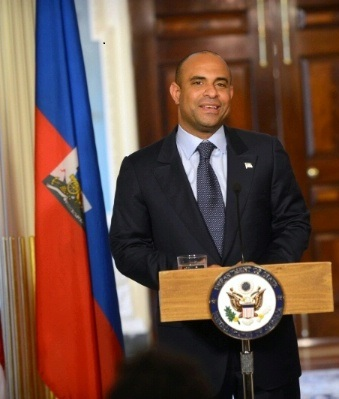 El primer ministro de Haití durante una visita al Departamento de Estado de los Estados Unidos.